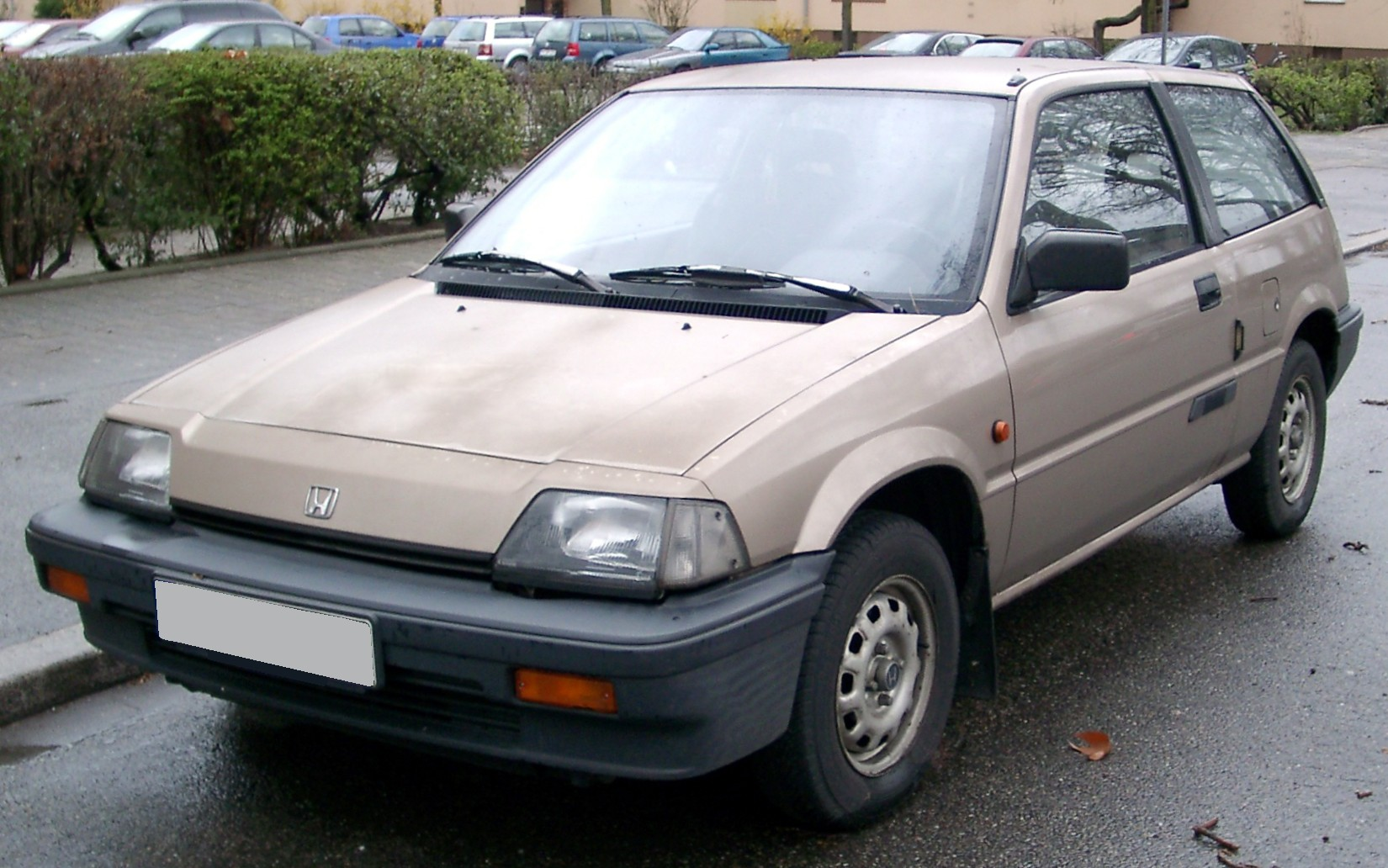 Honda Civic, 3. Generation